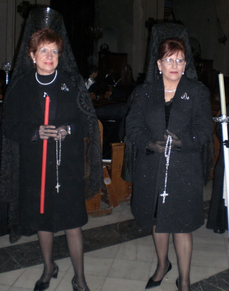 Mujeres de Traje y Mantilla, Semana Santa 08